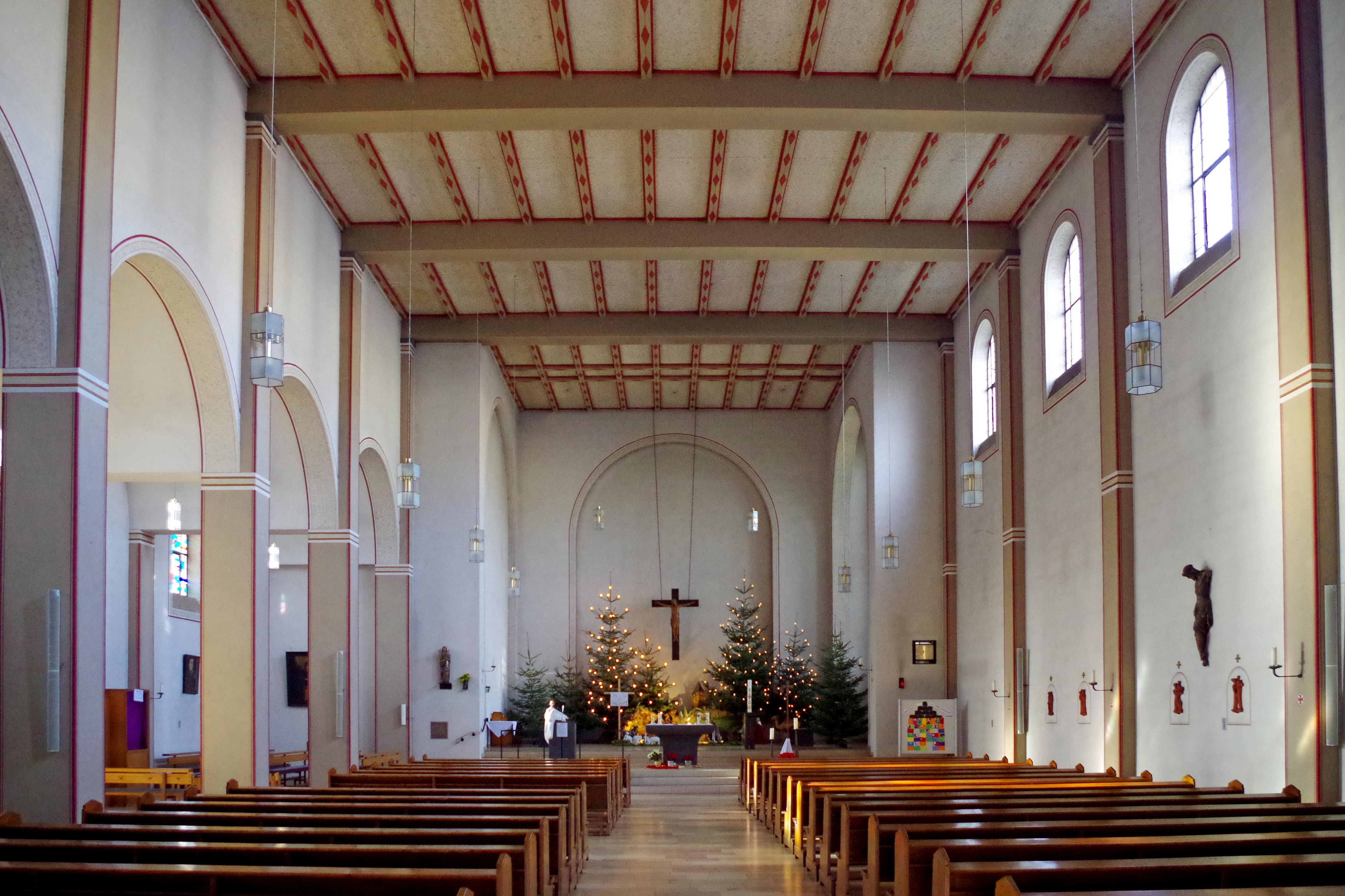 St. Johannes Baptist (Mechernich), Innenansicht mit Altarblick